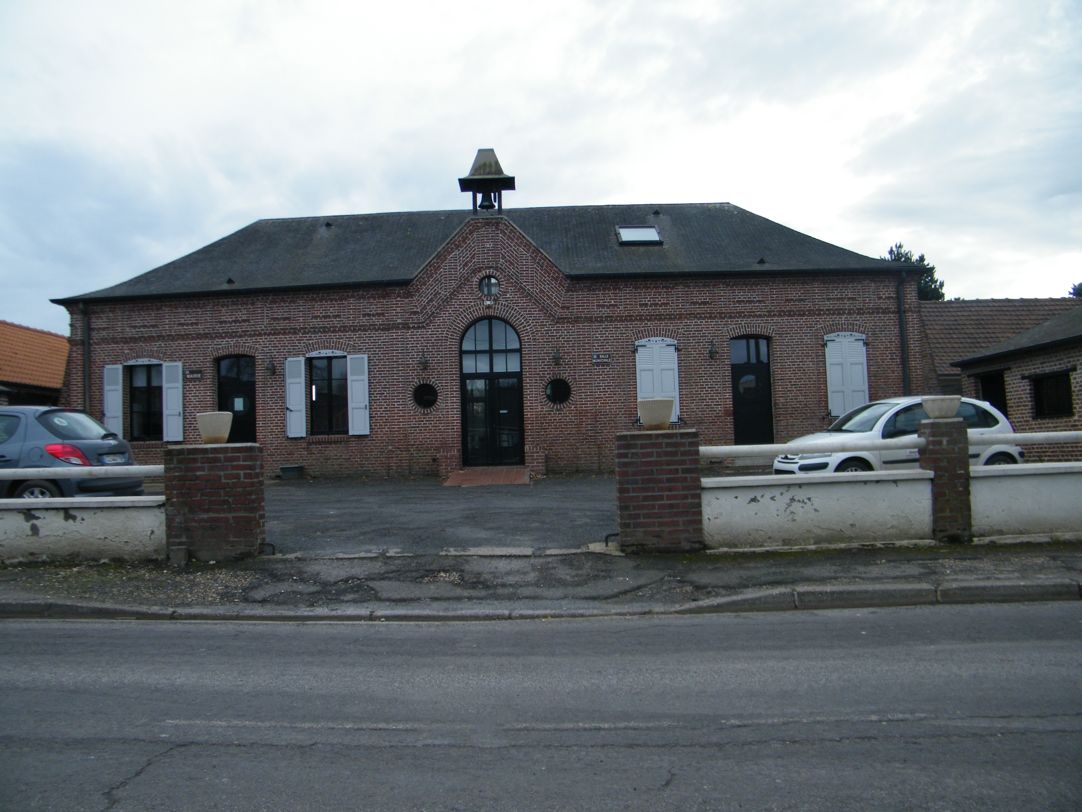 Mairie et salle communale.